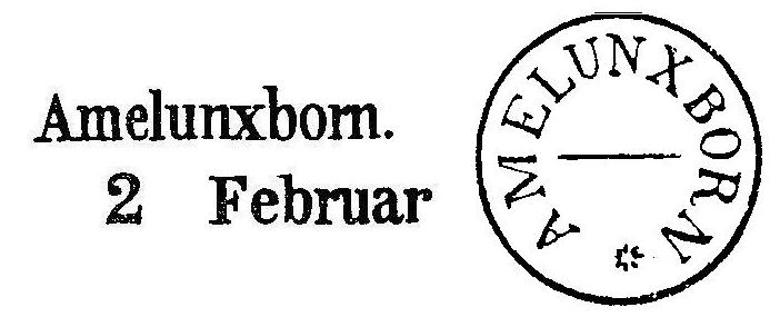 Herzogliche Poststempel Amelunxborn